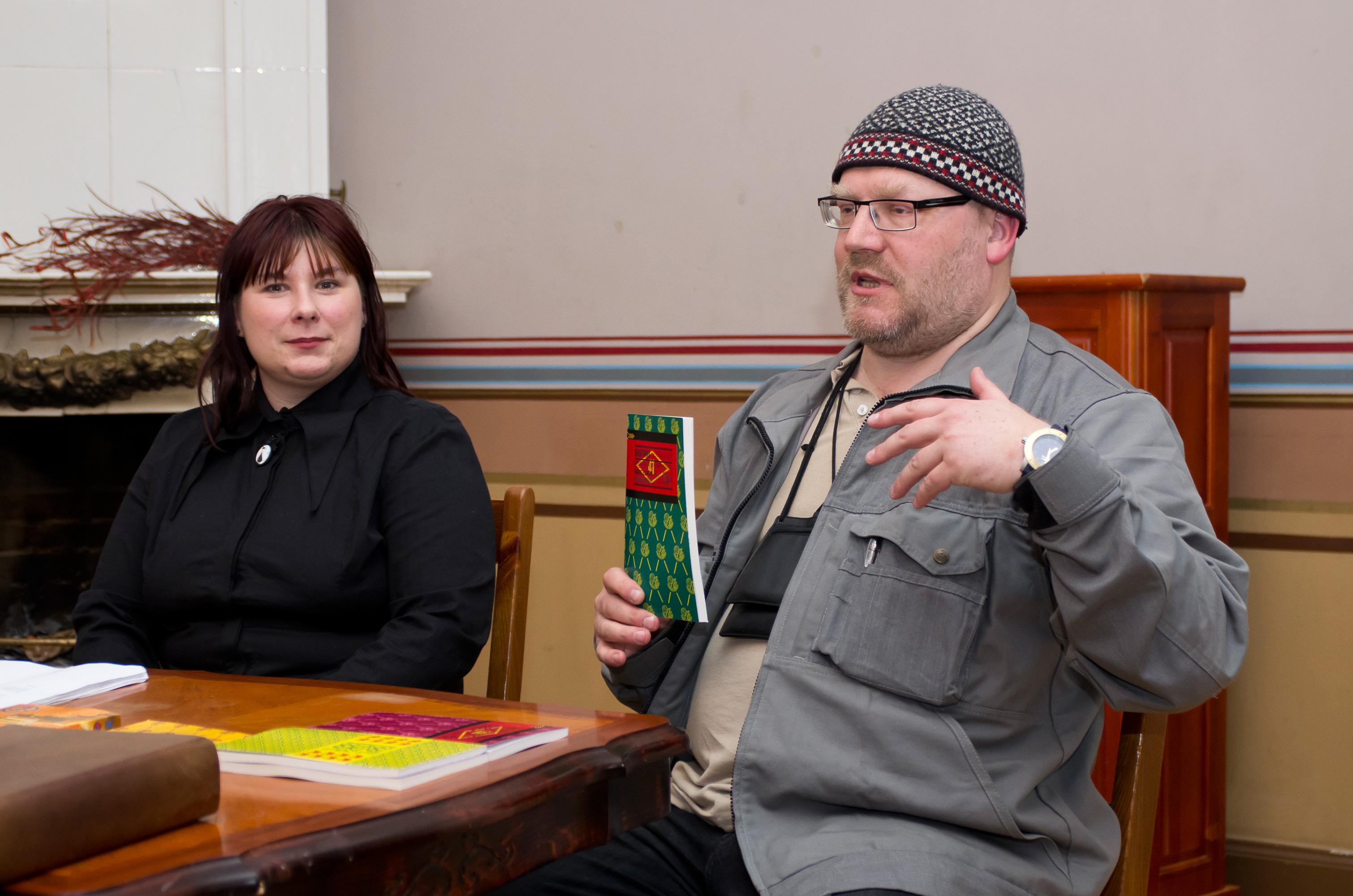 Ene Kallas ja Sven Kivisildnik Tartu kirjanike majas 23. aprillil 2013